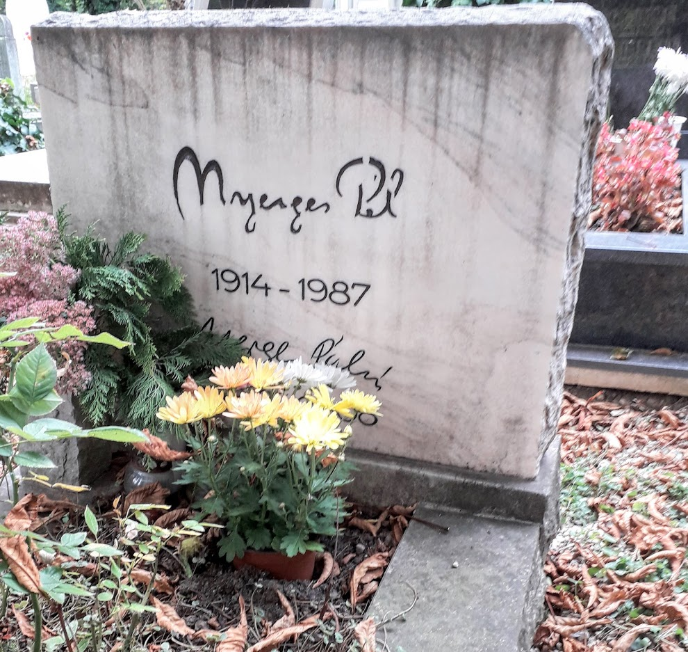 Nyerges Pál (1914- 1987) festő és grafikusművész farkasréti temetőben található síremléke. Helye: 2. parcella 93. sírhely